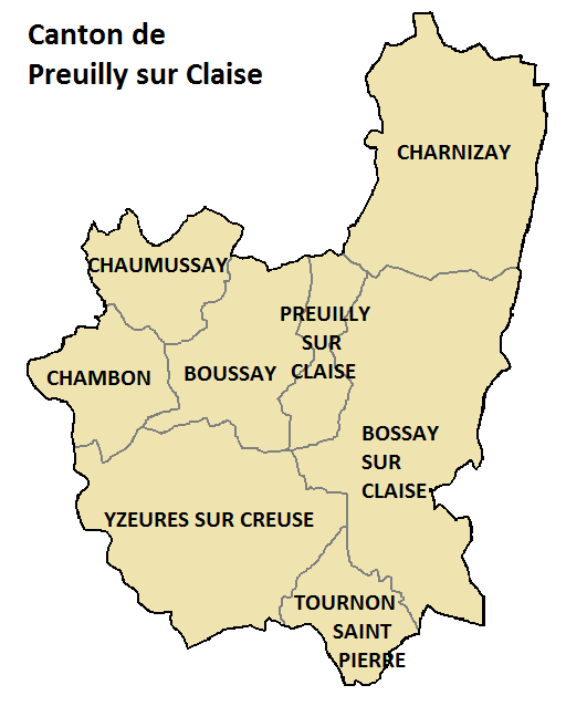 Localisation des commnunes dans le canton de Preuilly